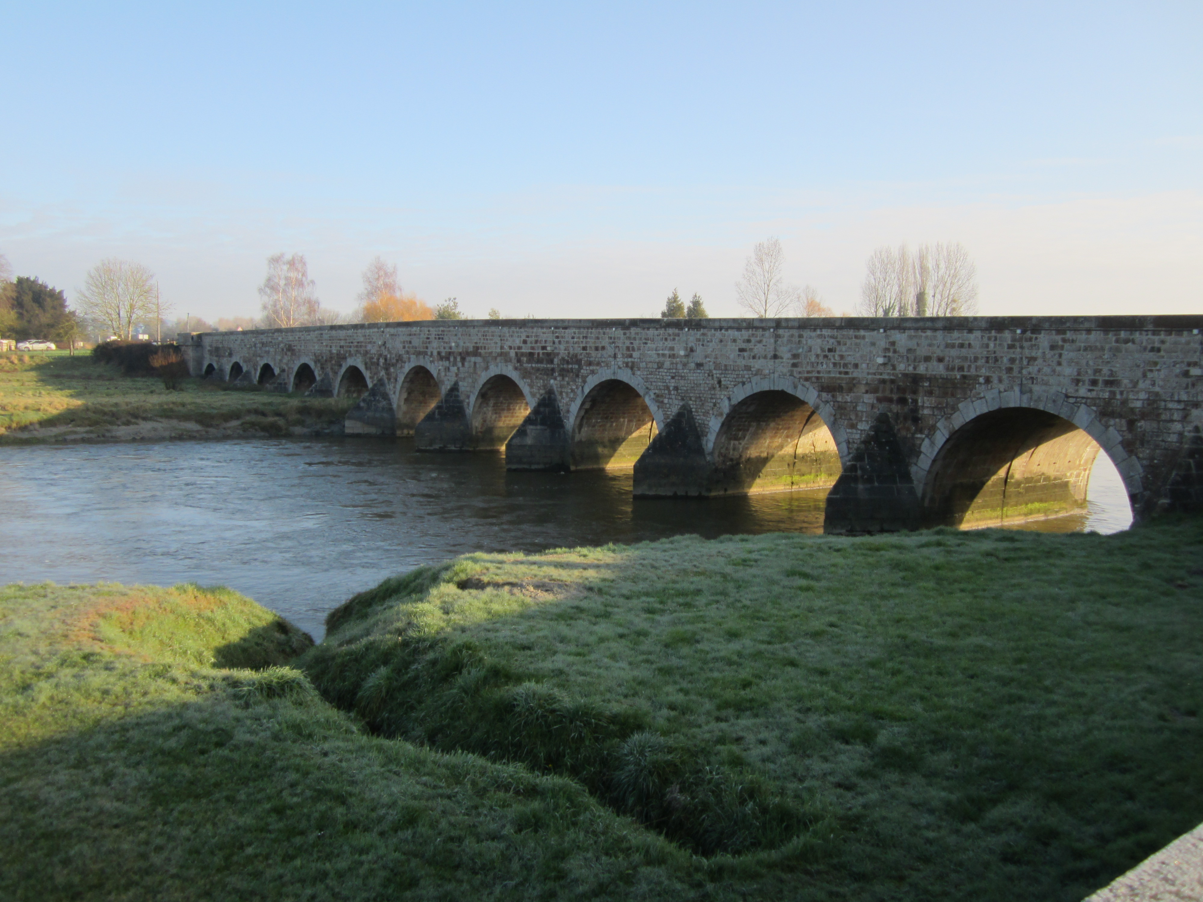 Pontaubault